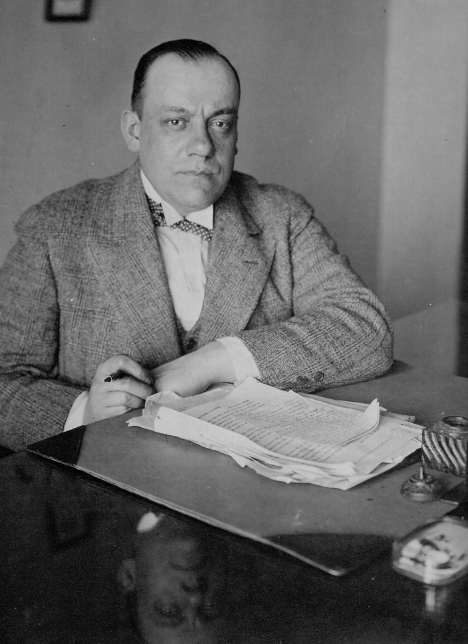 Photo de Camillien Houde en 1930